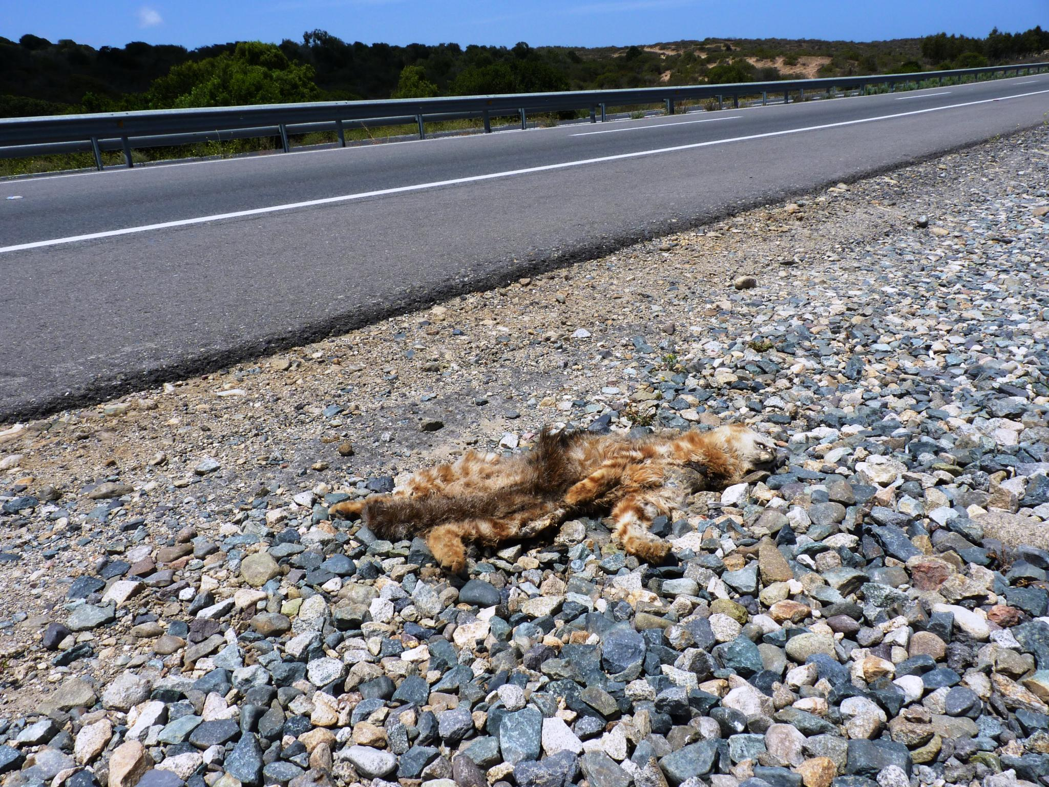 Colocolo (Leopardus colocolo). Ruta 5 norte Bosque de Santa Julia pasado 5 km al norte de Los Vilos